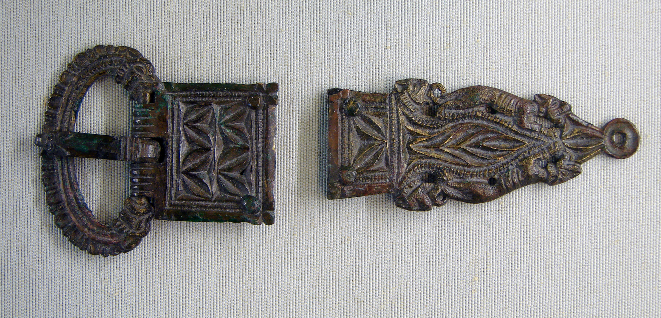 Boucle de ceinture. Fait partie du matériel d'une tombe masculine (la tombe I) à Monceau-le-Neuf dans l'Aisne. Epoque gallo-romaine, 400 + JC. Musée de Laon.